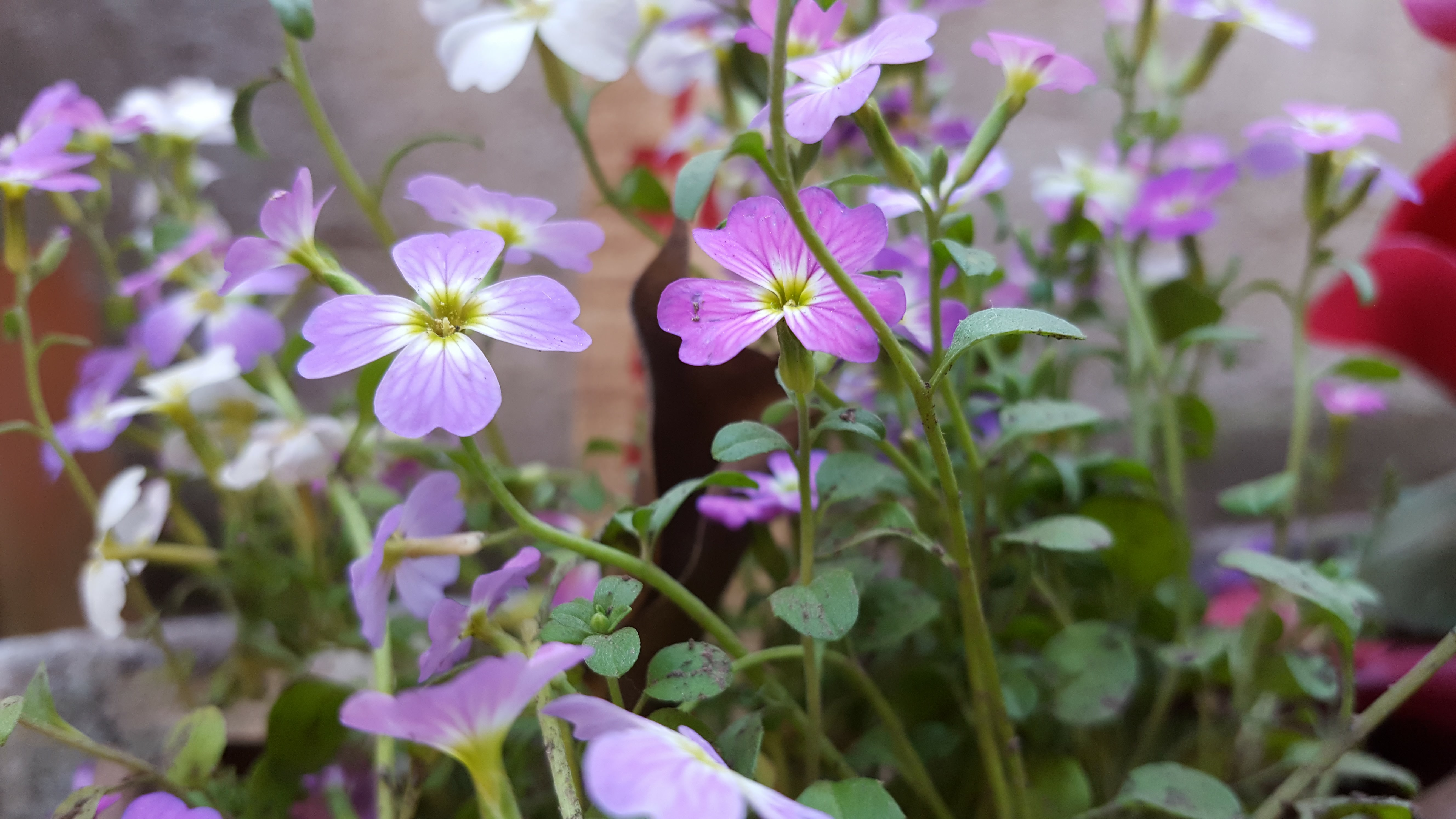 Plantadas en macetas recicladas para observar su crecimiento de forma educativa.